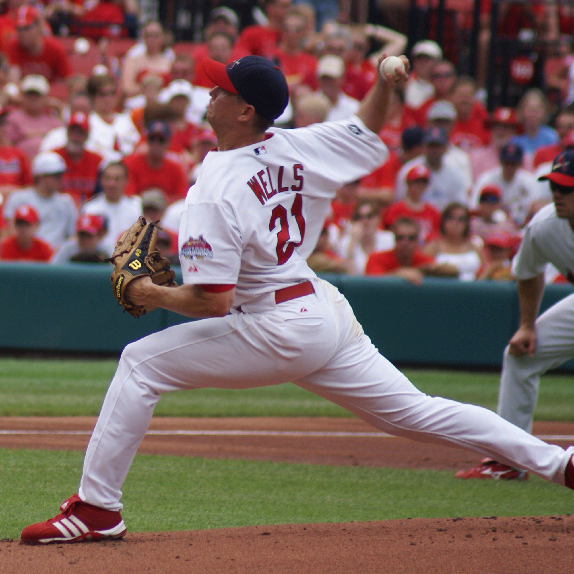 Kip Wells